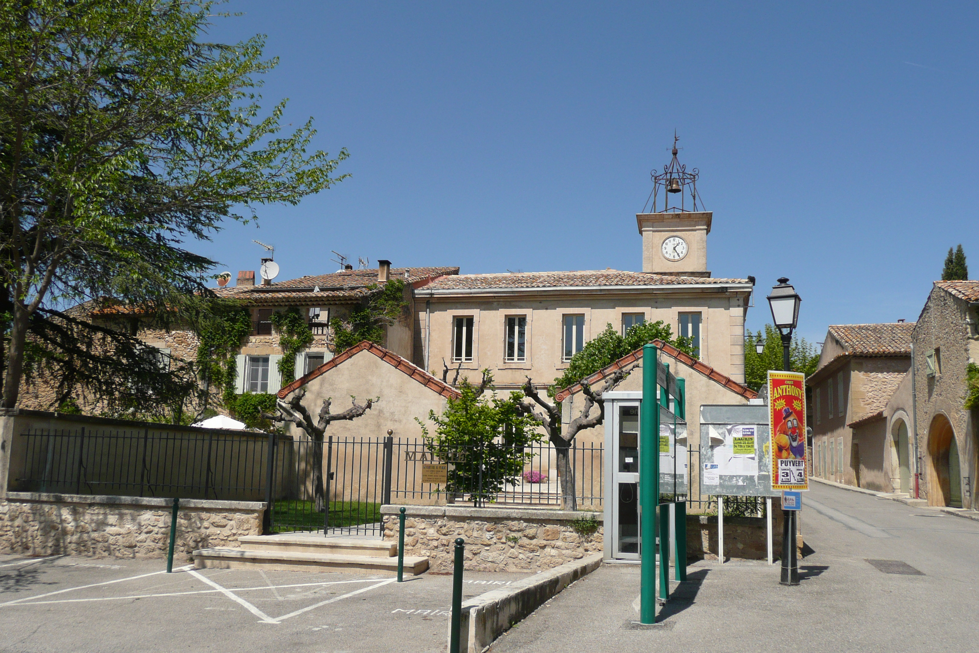 Puyvert.